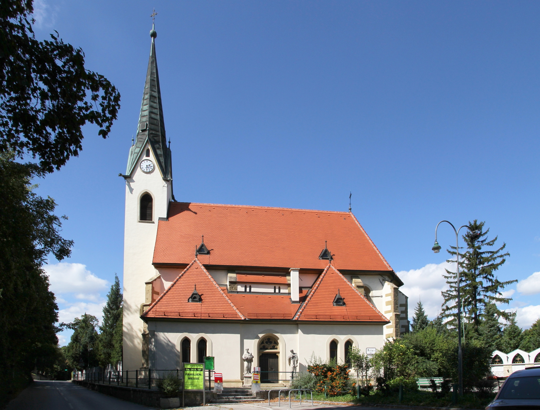 Die röm.-kath. Pfarrkirche hl. Veit im Ortsteil Kritzendorf der niederösterreichischen Stadt Klosterneuburg.